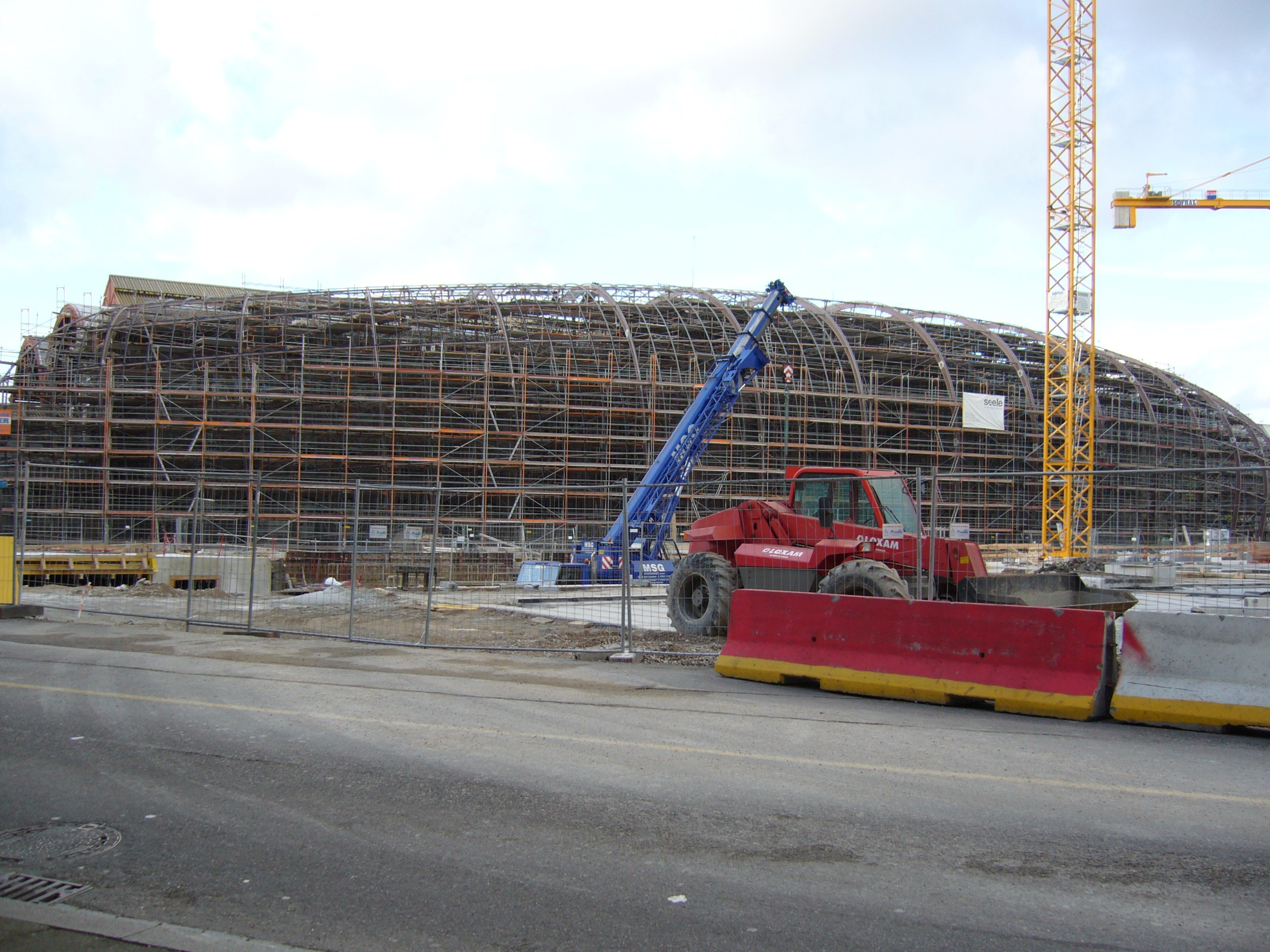 Hbf Strasbourg januar2007